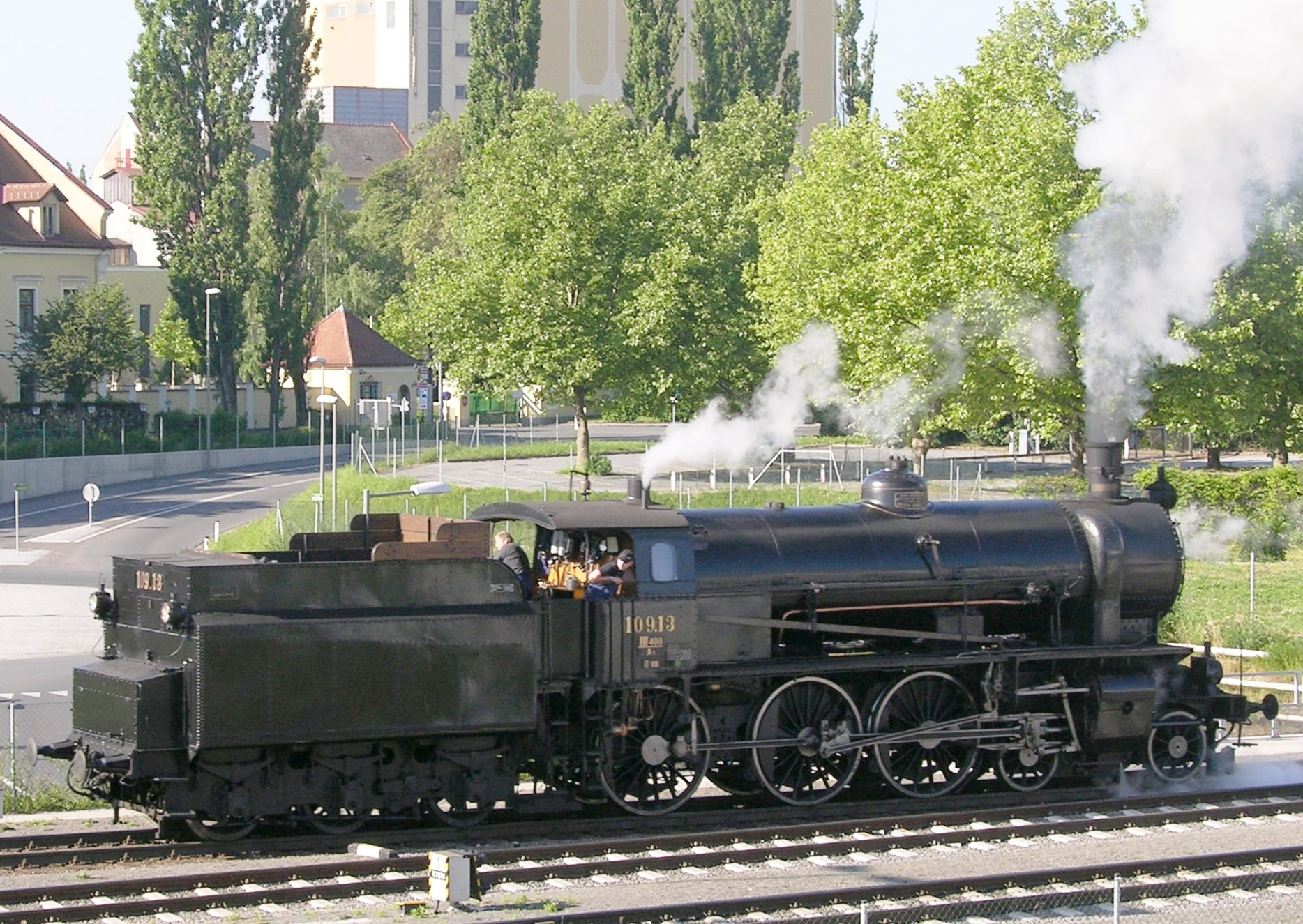 SB 109.13 bei der Lokparade in Graz am 19.Mai 2007